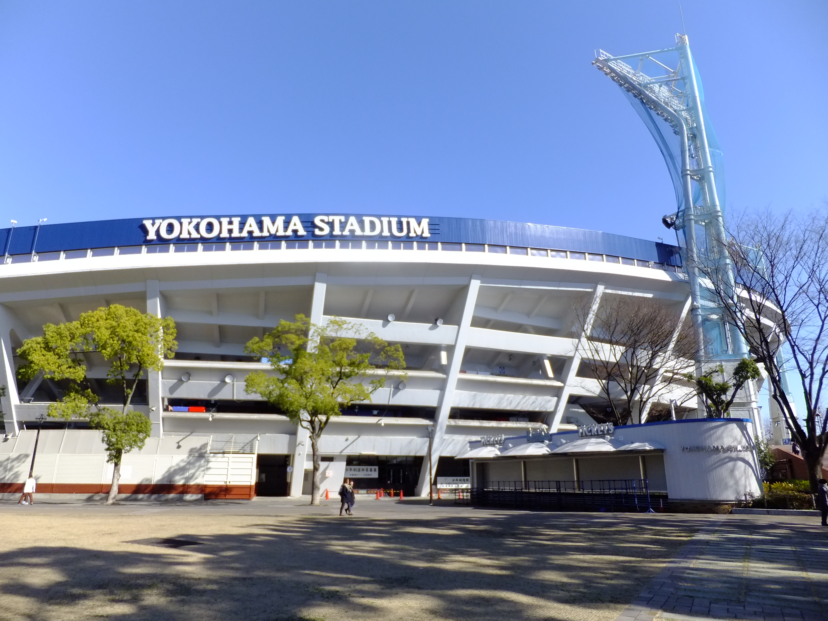 横浜DeNAベイスターズの本拠地 横浜スタジアム